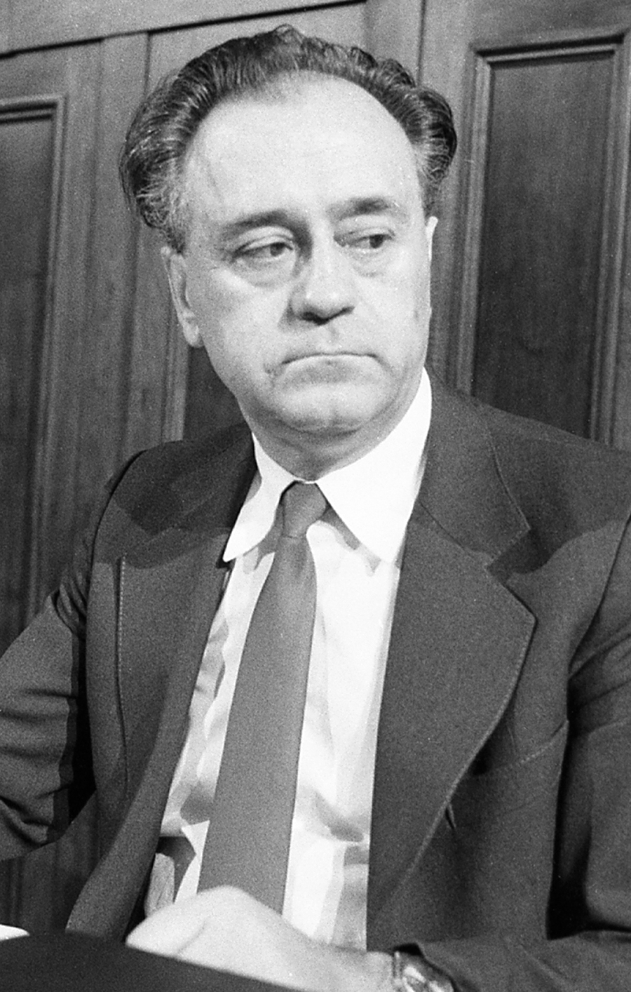 Srpski (latinica): Nikola Stojanović (Ljubija kod Prijedora, 19. avgust 1933), ekonomista i društveno-politički radnik SFR Jugoslavije i SR Bosne i Hercegovine.